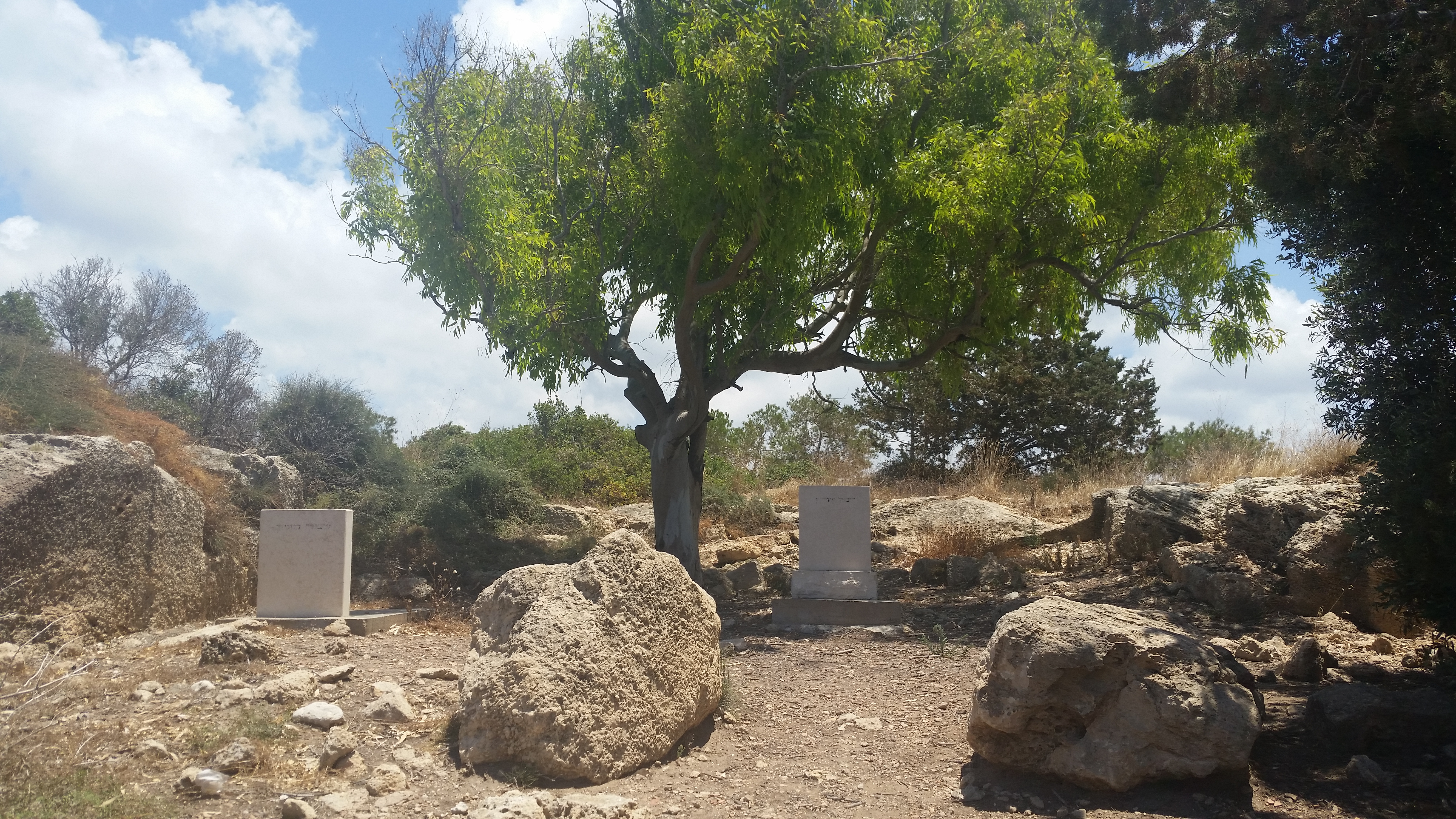 מצבות באזור בו שכן בעבר הכפר הארמני שייח' בוריק על רכס הכורכר ממזרח ומול נוונ ים ליד עתלית